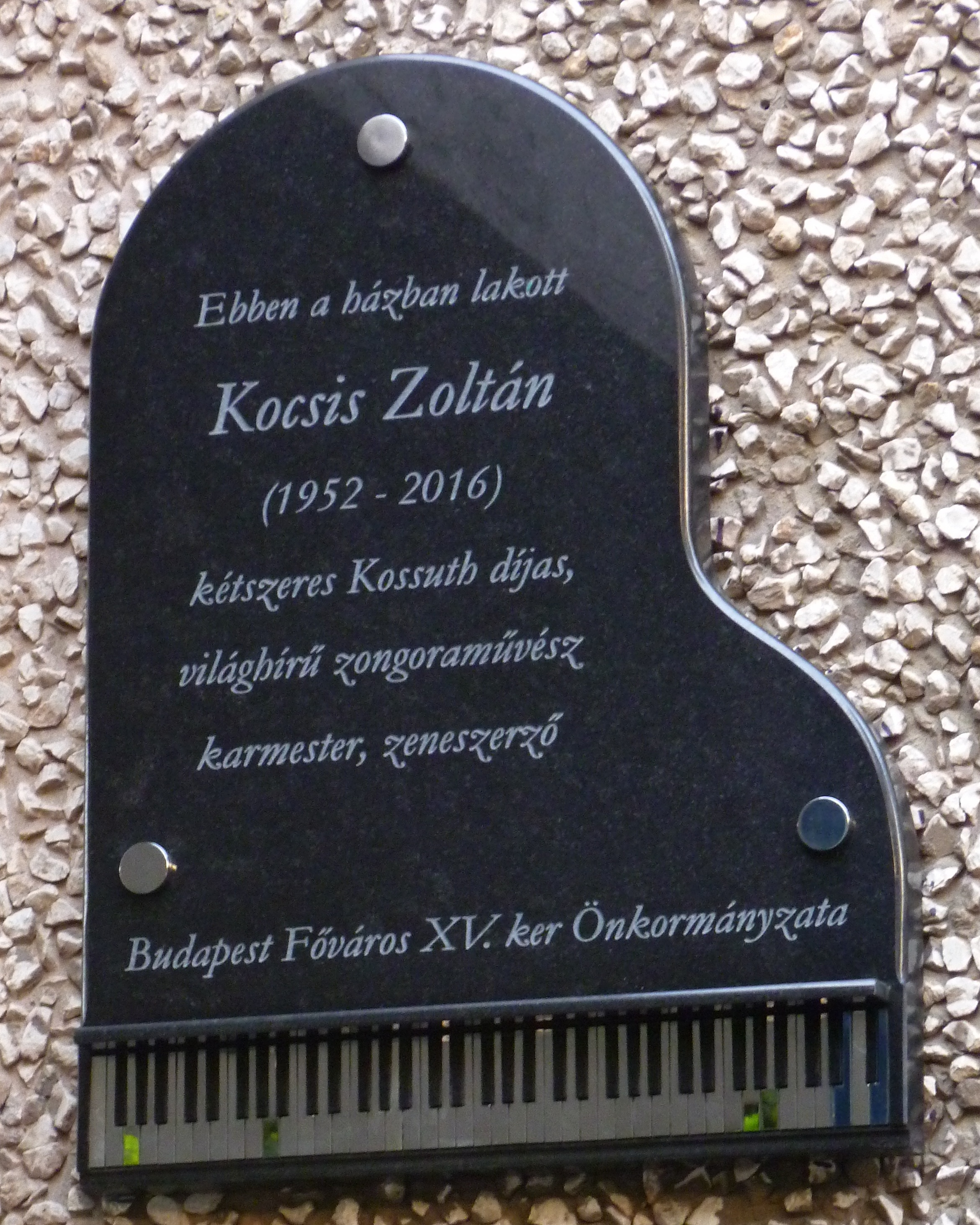 Kocsis Zoltán emléktáblája Újpalotán a Nyírpalota út 33. szám mellett.